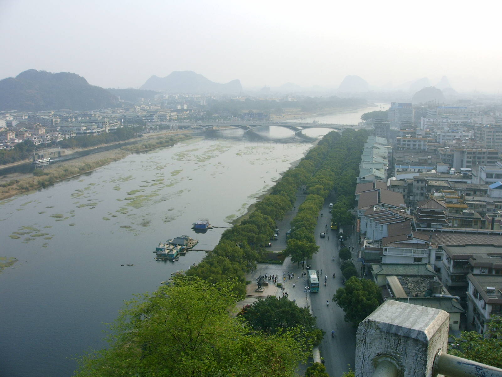 Guilin, China, Li-Fluss vom Fuboberg aus